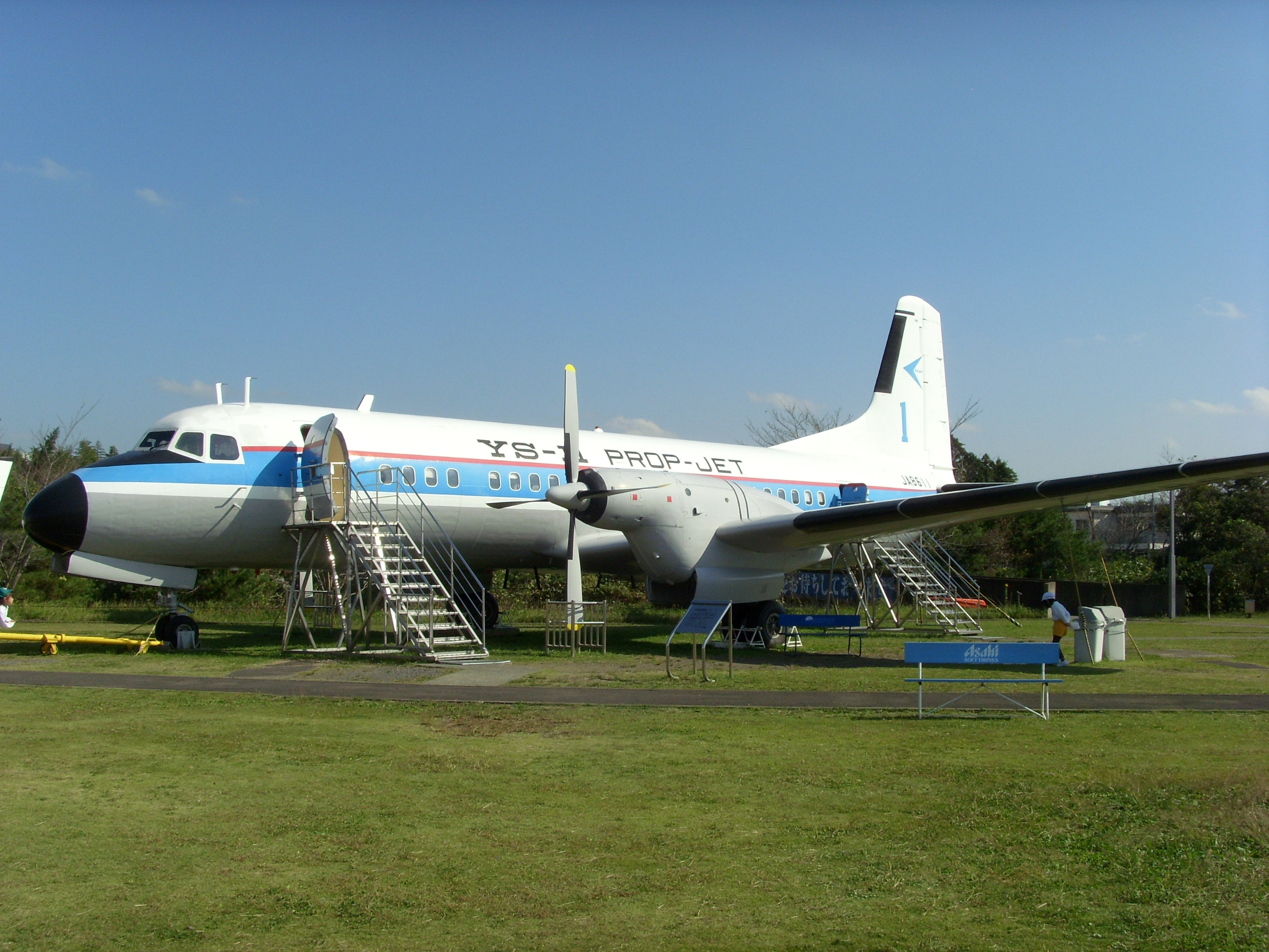 Prototyp der YS-11 im Museum of Aeronautical Sciences nahe Narita/Tokio